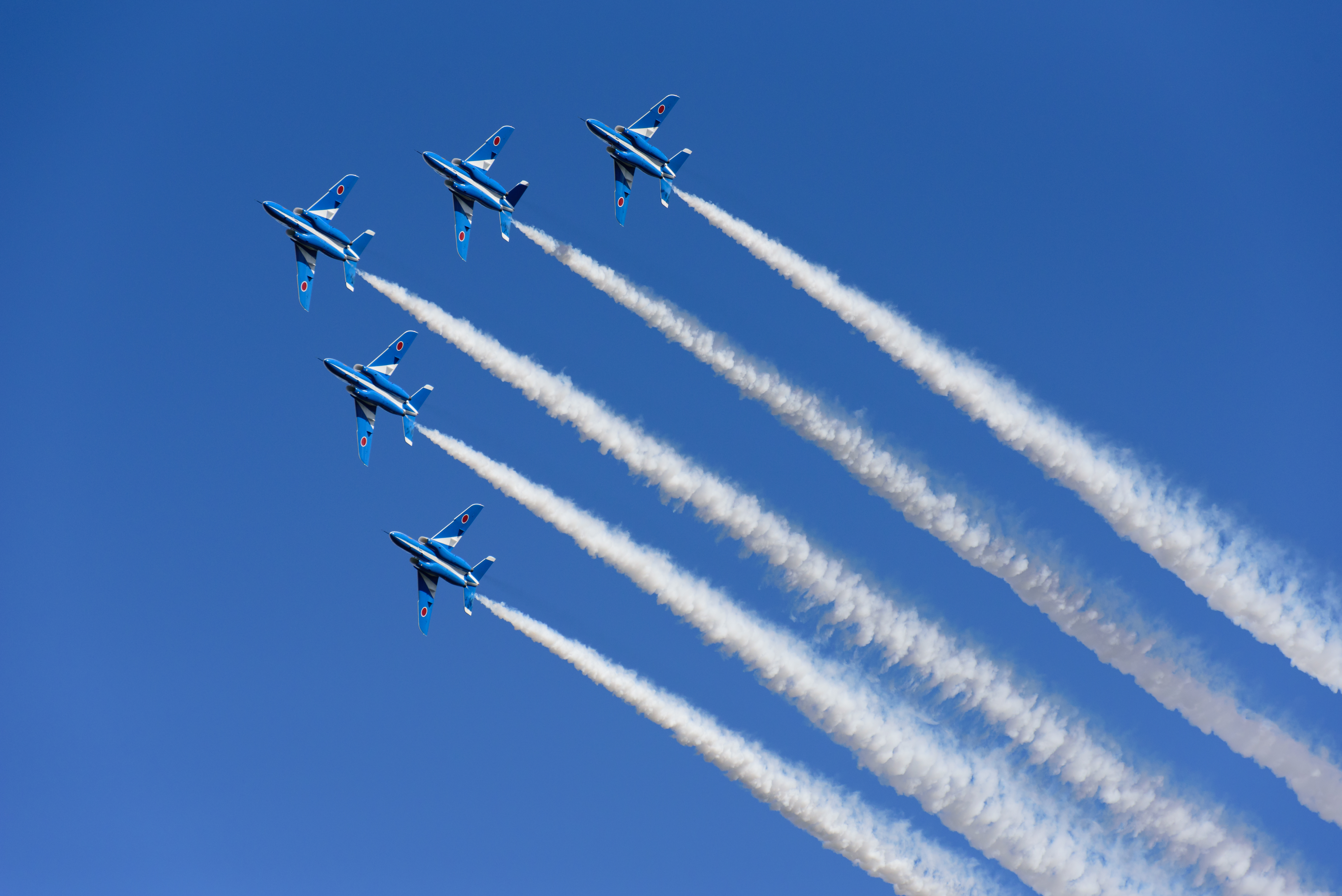 Iruma Air Base Festival 2015